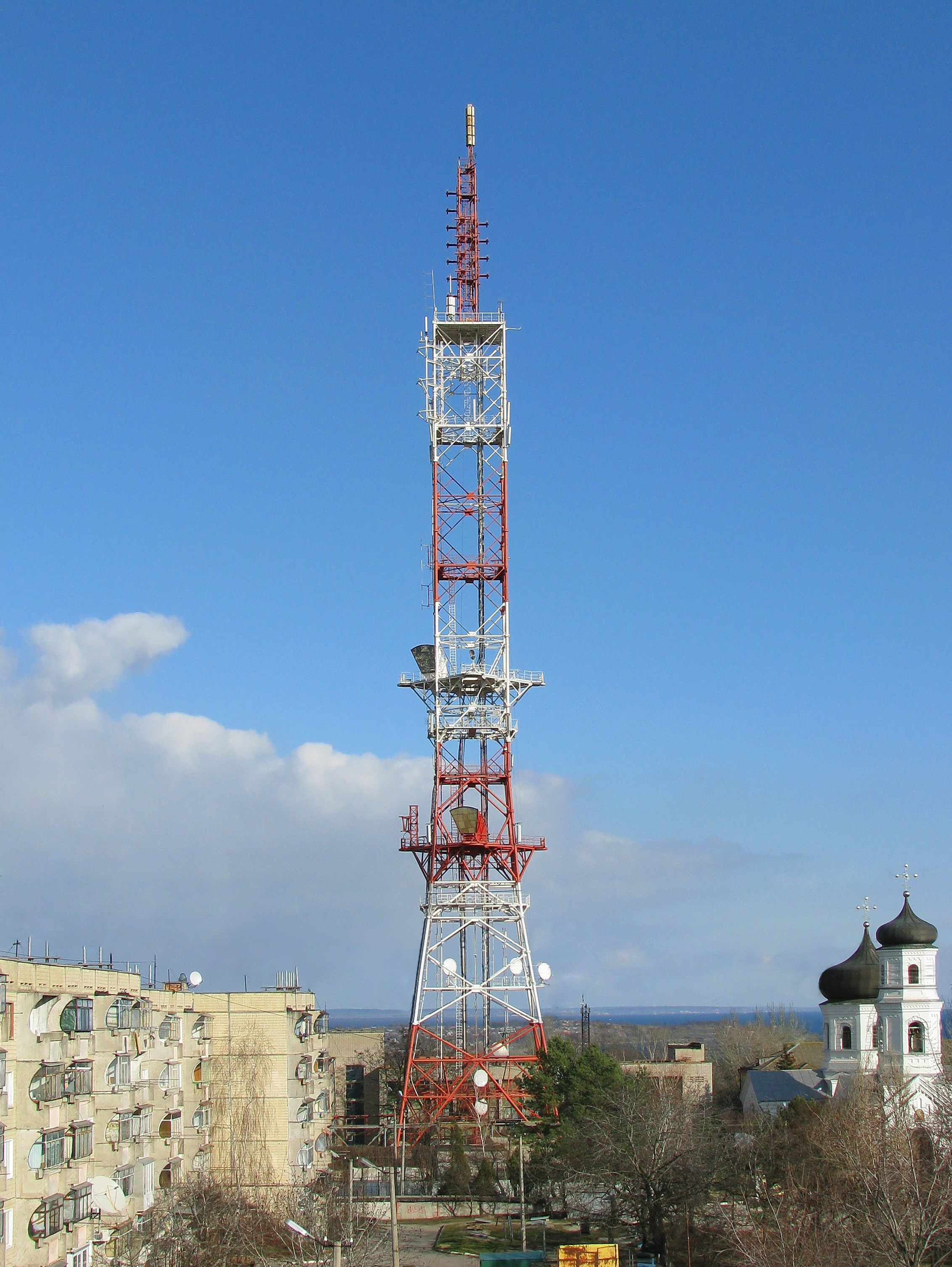 Телевизионная вышка в г.Никополь, Днепропетровская область